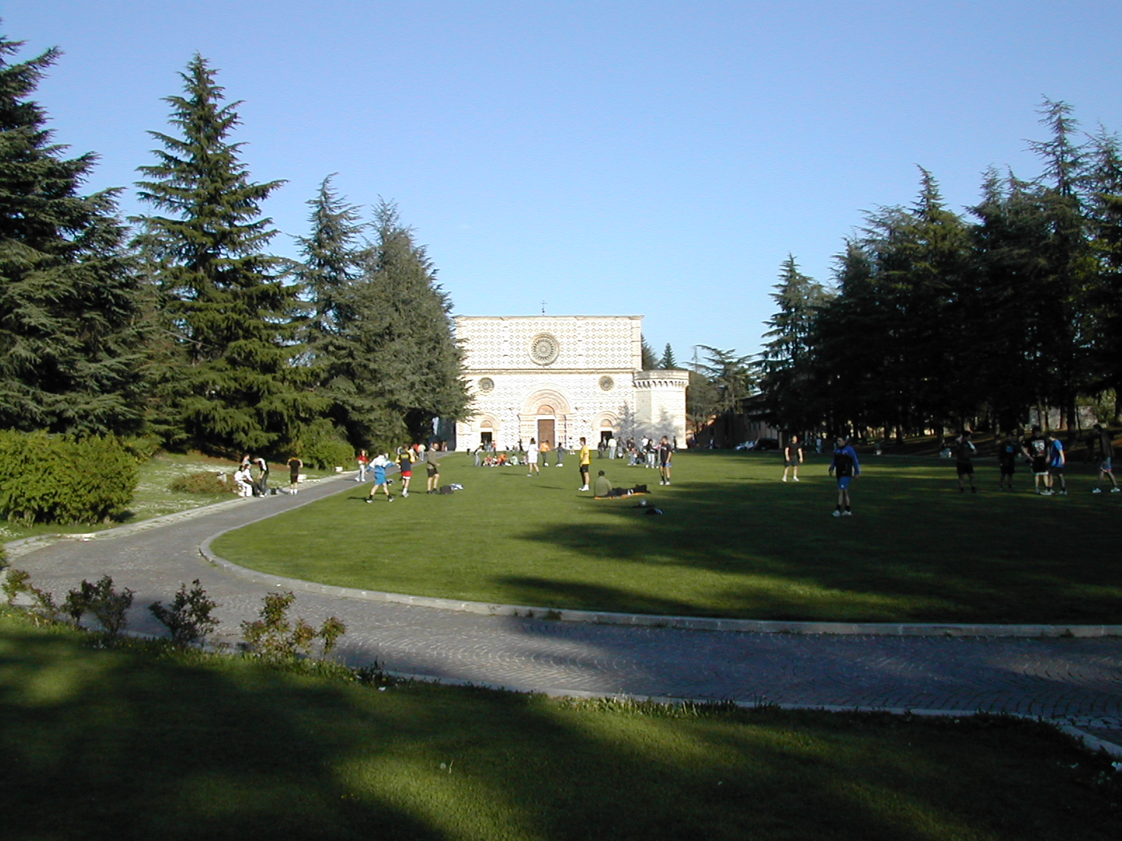 l'Aquila Basilica di Santa Maria di Colle Maggio